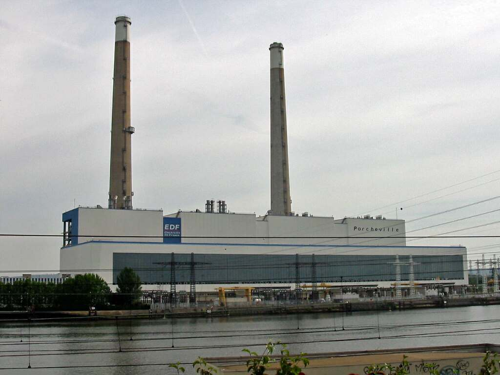 Centrale thermique EDF de Porcheville Photo JH Mora, août 2005 Porcheville